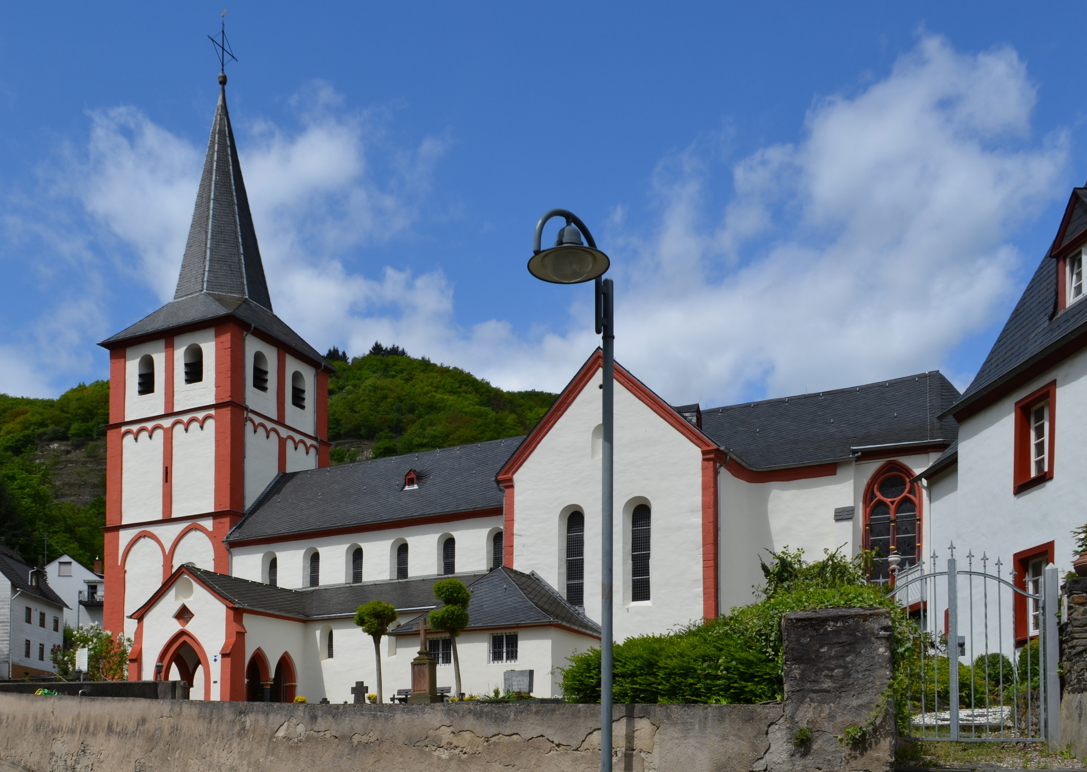 Bartholomeüskerk